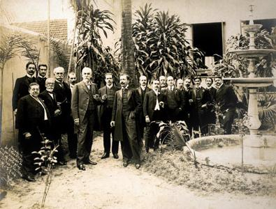 Machado de Assis (seg. do canto esquerdo, de terno preto) com grupo de intelectuais (jornalistas, escritores e artistas cariocas).